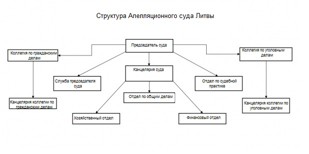 Структурная схема Апелляционного суда Литвы